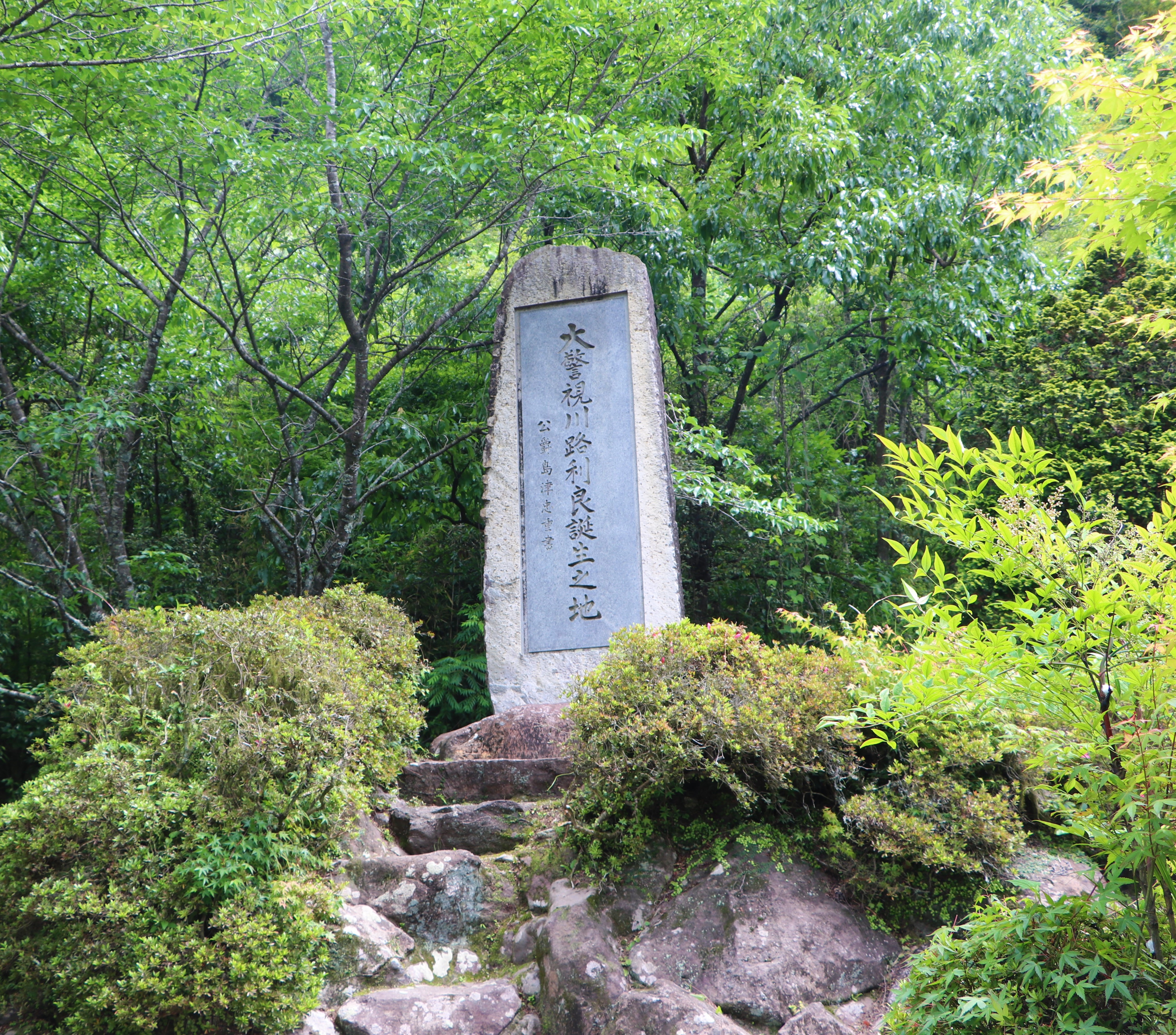 鹿児島市皆与志町の川路利良の誕生地の碑。